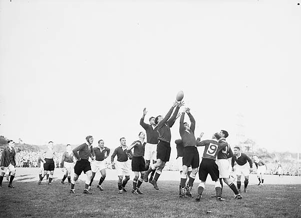 Teitl Cymraeg/Welsh title:Llanelli yn erbyn y Springboks ar Barc y Strade Ffotograffydd/Photographer: Geoff Charles (1909-2002) Dyddiad/Date: October 26, 1951. Cyfrwng/Medium: Negydd ffilm / Film negative Cyfeiriad/Reference: (gch02301) Rhif cofnod / Record no.: 3368291 Rhagor o wybodaeth am gasgliad Geoff Charles yn Llyfrgell Genedlaethol Cymru More information about the Geoff Charles Collection at the National Library of Wales Mae ffotograffau Geoff Charles hefyd yn rhan o Broject Europeana Libraries Geoff Charles' photographs also form part of the Europeana Libraries Project